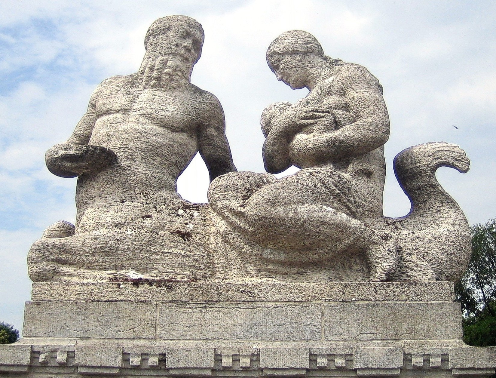 Berlin, Rudolph-Wilde-Park. Skulptur von Richard Guhr (1873-1956) auf der Carl-Zuckmayer-Brücke.